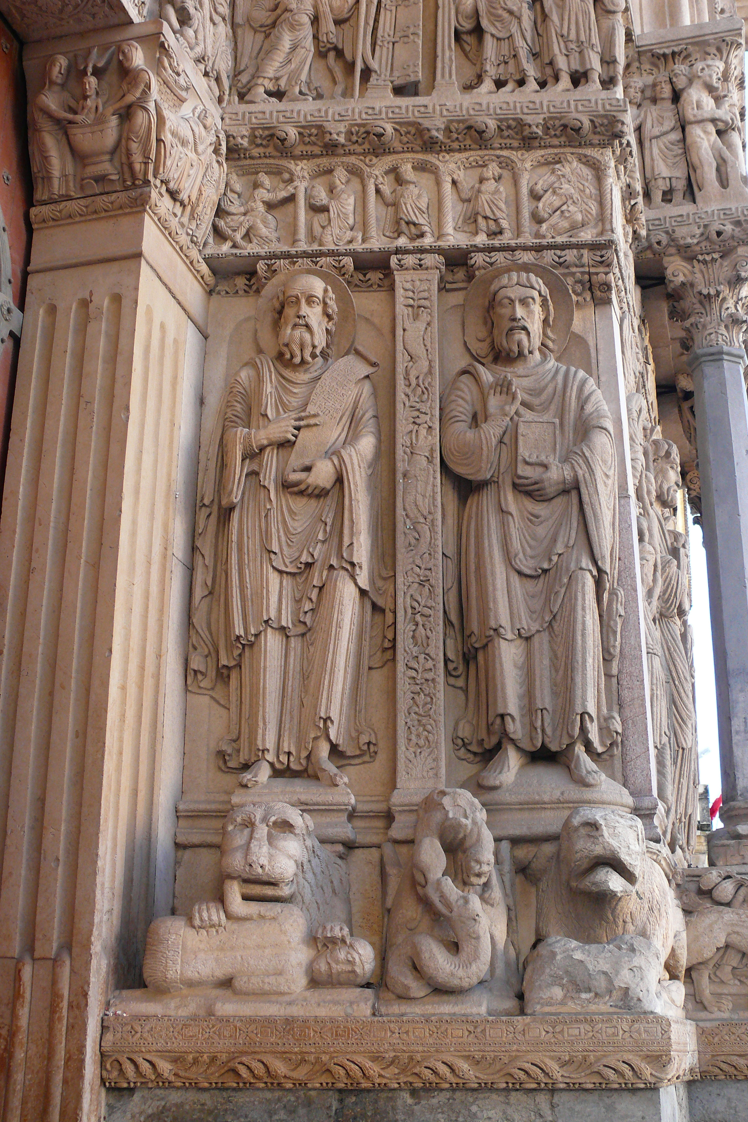 Detail des Portals von St.Trophime in Arles